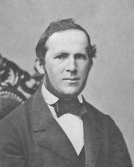 Karl Greith (1828-1887), Schweizer Komponist und Kirchenmusiker. Tätigkeit u.a. in St. Gallen und München. Sohn von Franz Josef Greith (1799-1869)